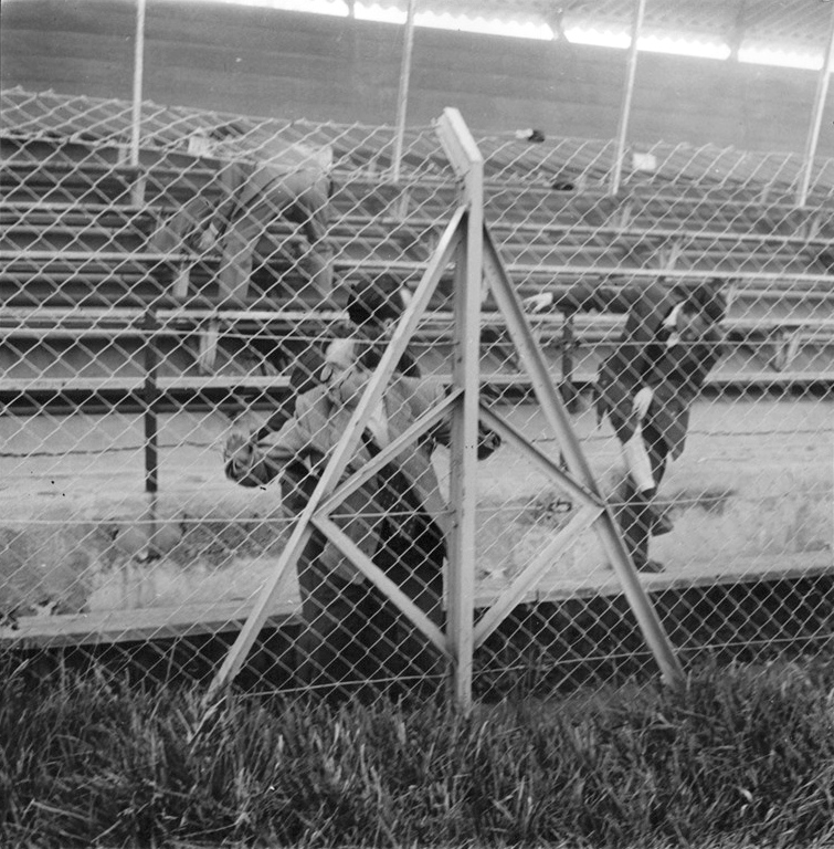 Människor flyr från fotbollsstadion i El-Biar efter bombdådet.